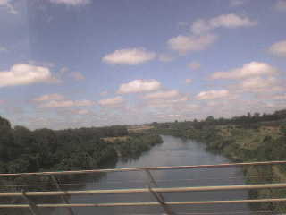 Imagen tomada en la ruta 5 desde el Puente rio Bueno